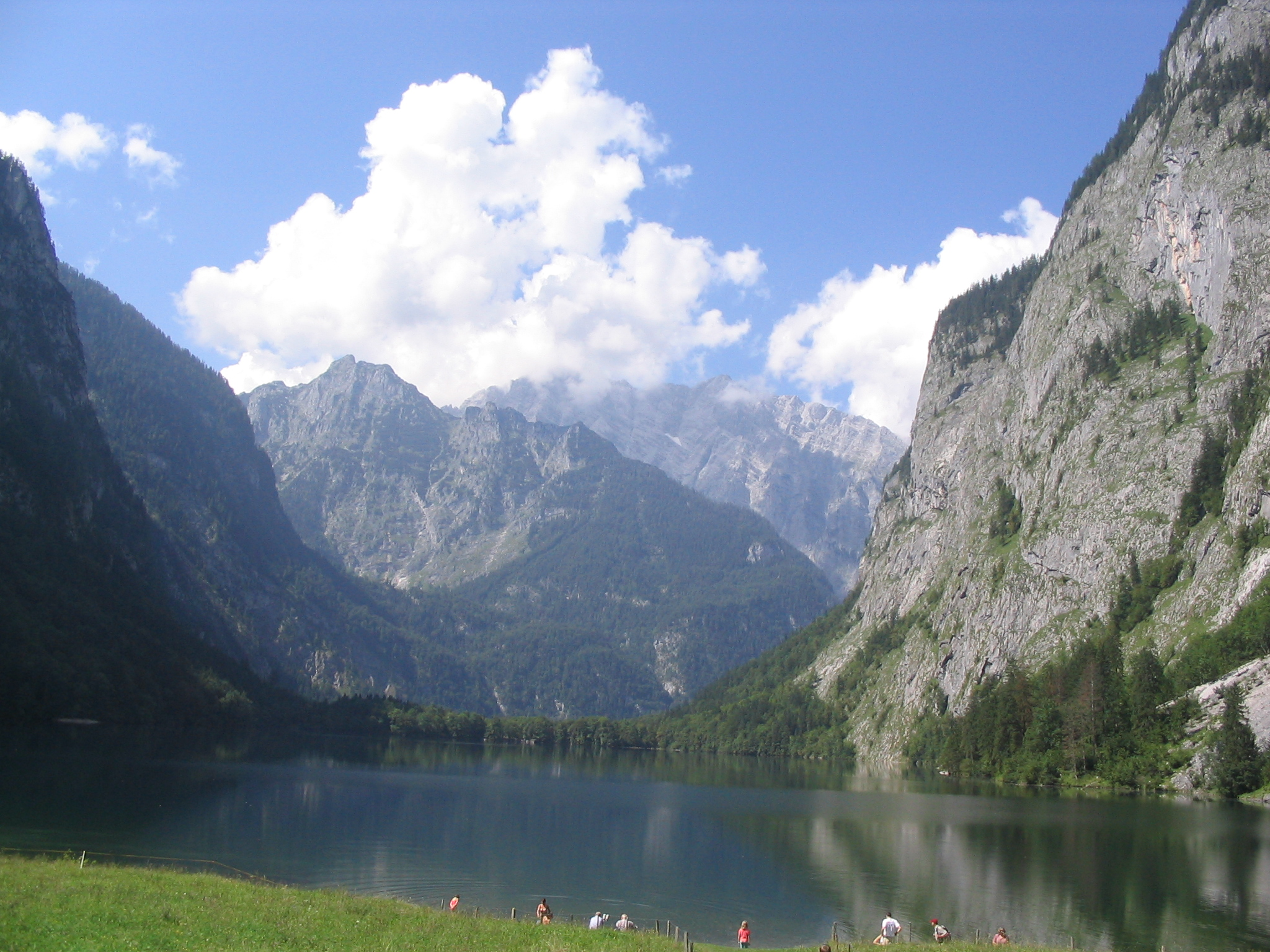 Obersee von der Fischunkelalm aus photographiert